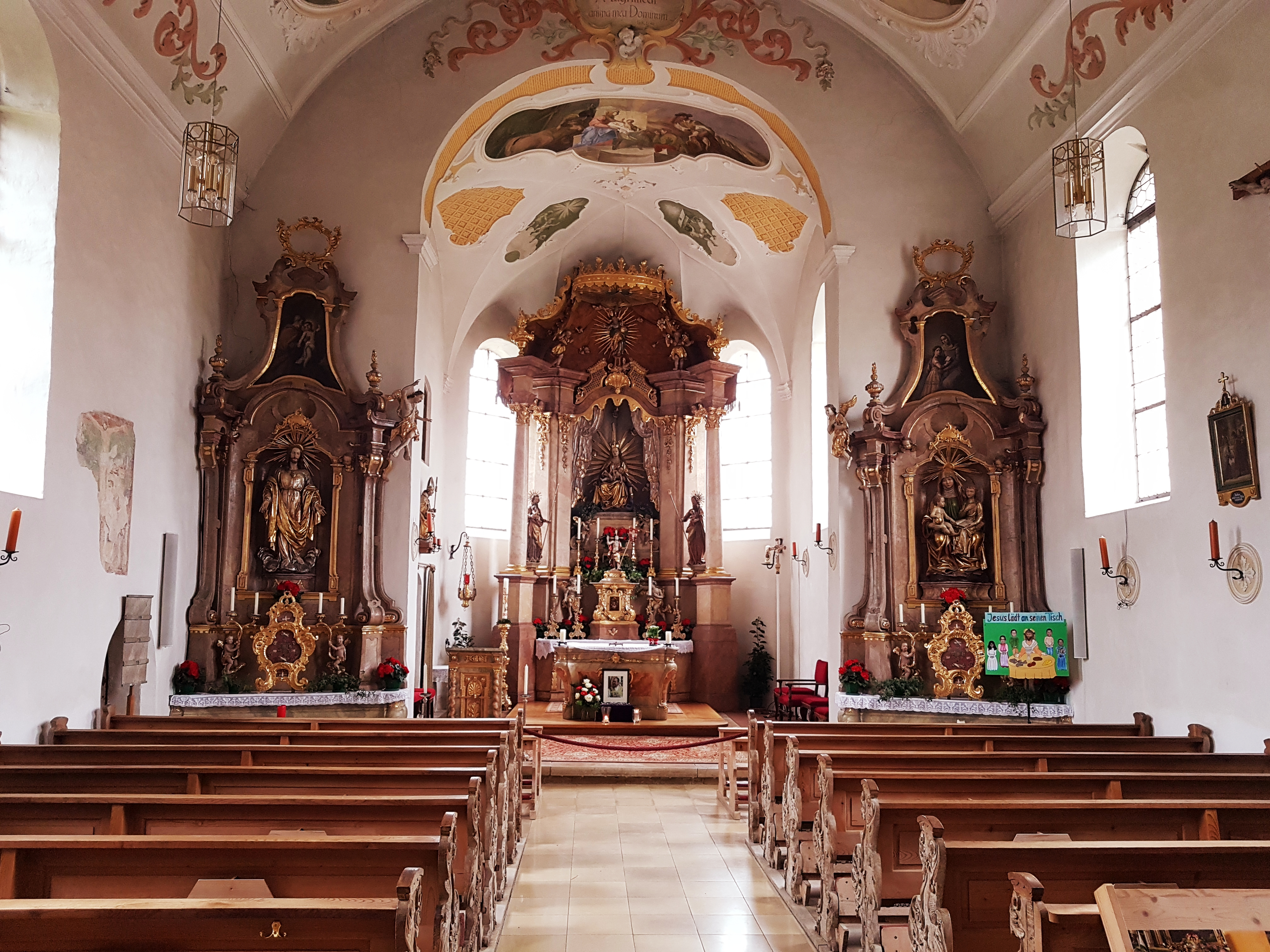 St. Anna (Schöffau)